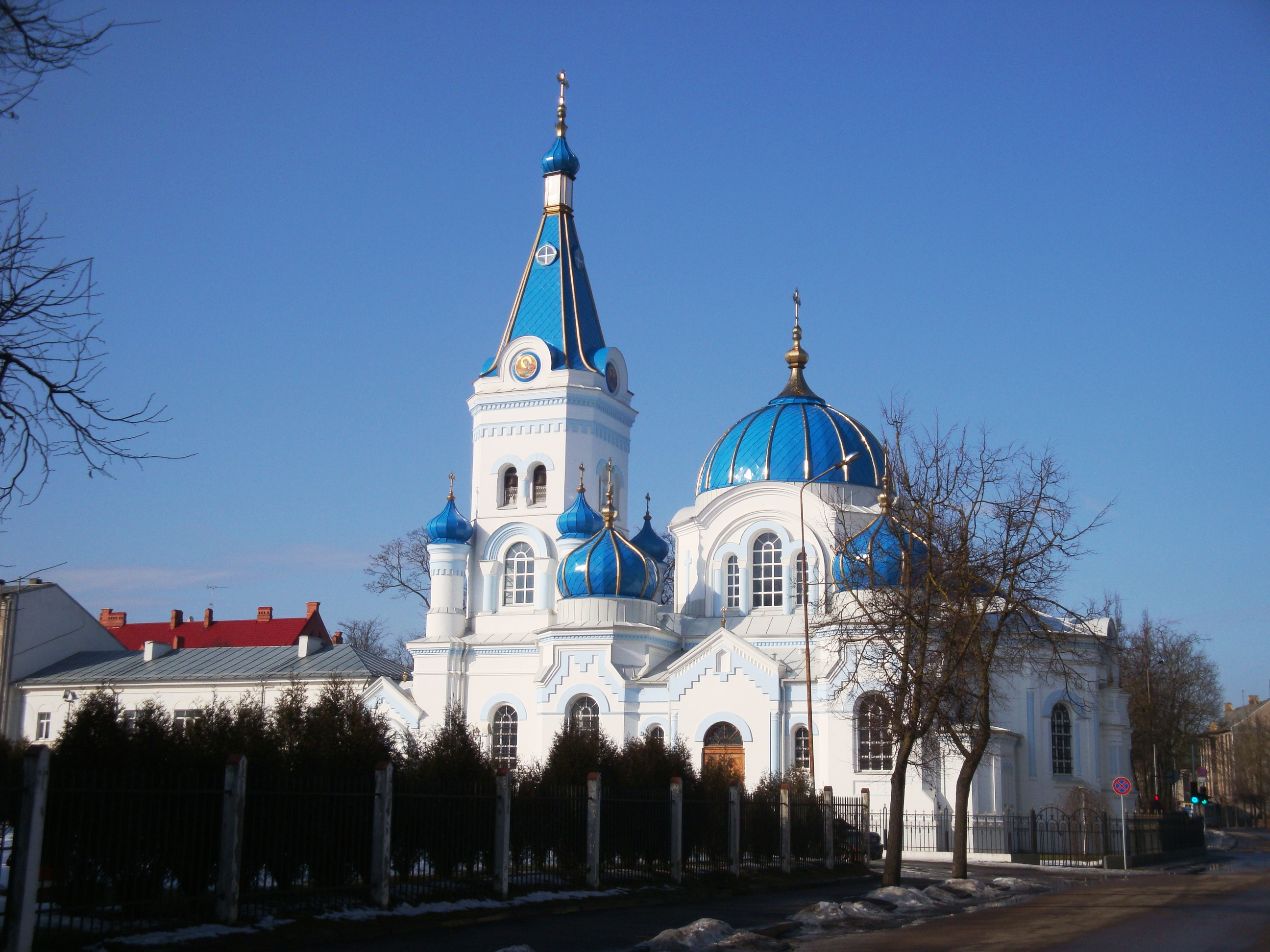 Ortodox church, Jelgava